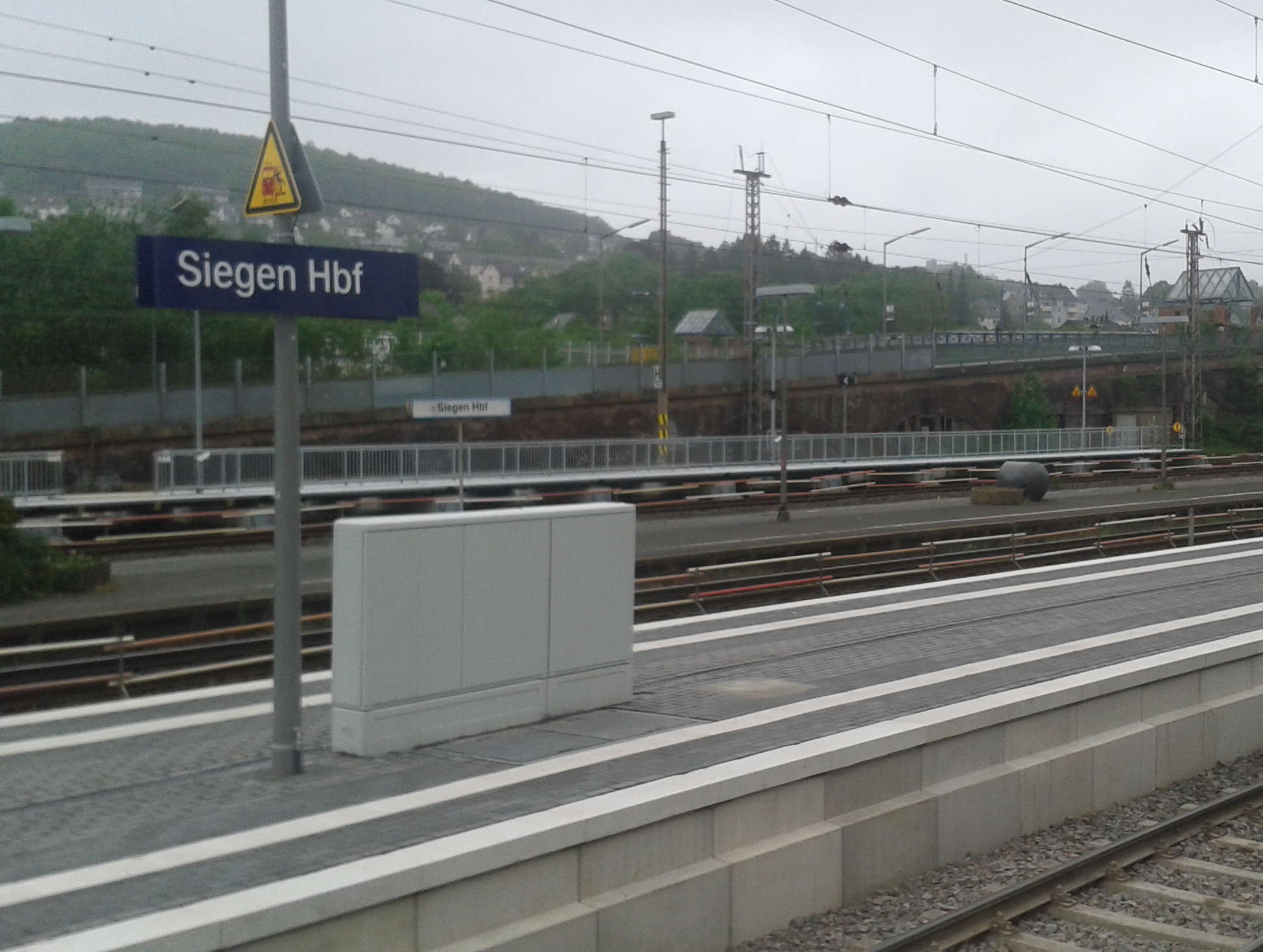 Sanierter Hausbahnsteig Bahnhof Siegen